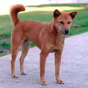 Jindo-dog1